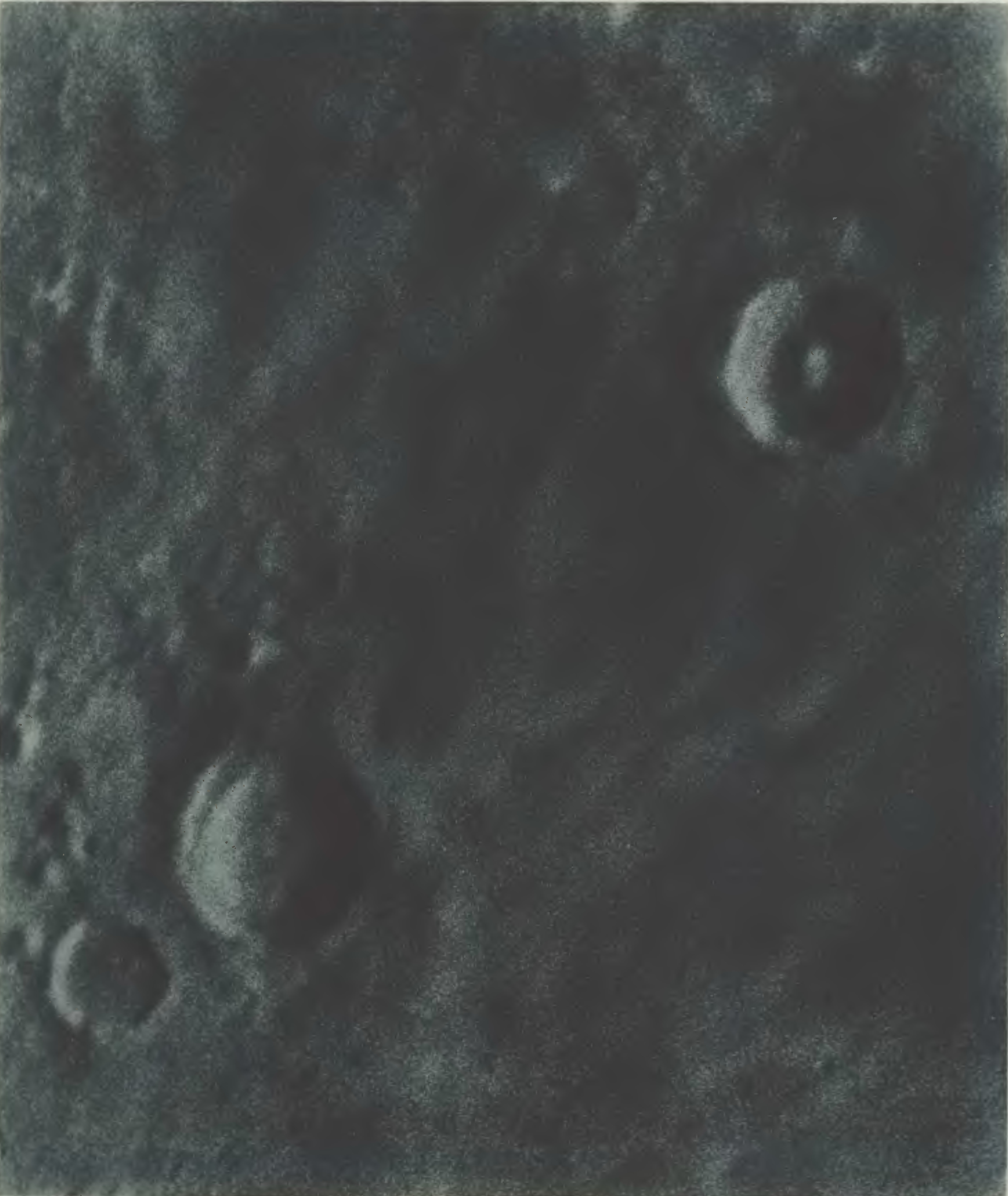 Photographischer Mond-Atlas vornehmlich auf Grund von focalen Negativen der Lick-Sternwarte im Massstabe eines Monddurchmessers von 10 Fuss ausgeführt von Professor Ladislaus Weinek. Heft VII. Tafel 132